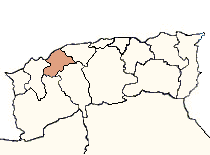 Localisation du département de Mostaganem, 1962.